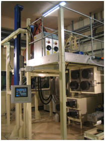 Planta experimental de extrusión de fibras termoplásticas